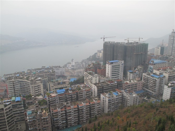 重庆市奉节县新县城俯瞰图